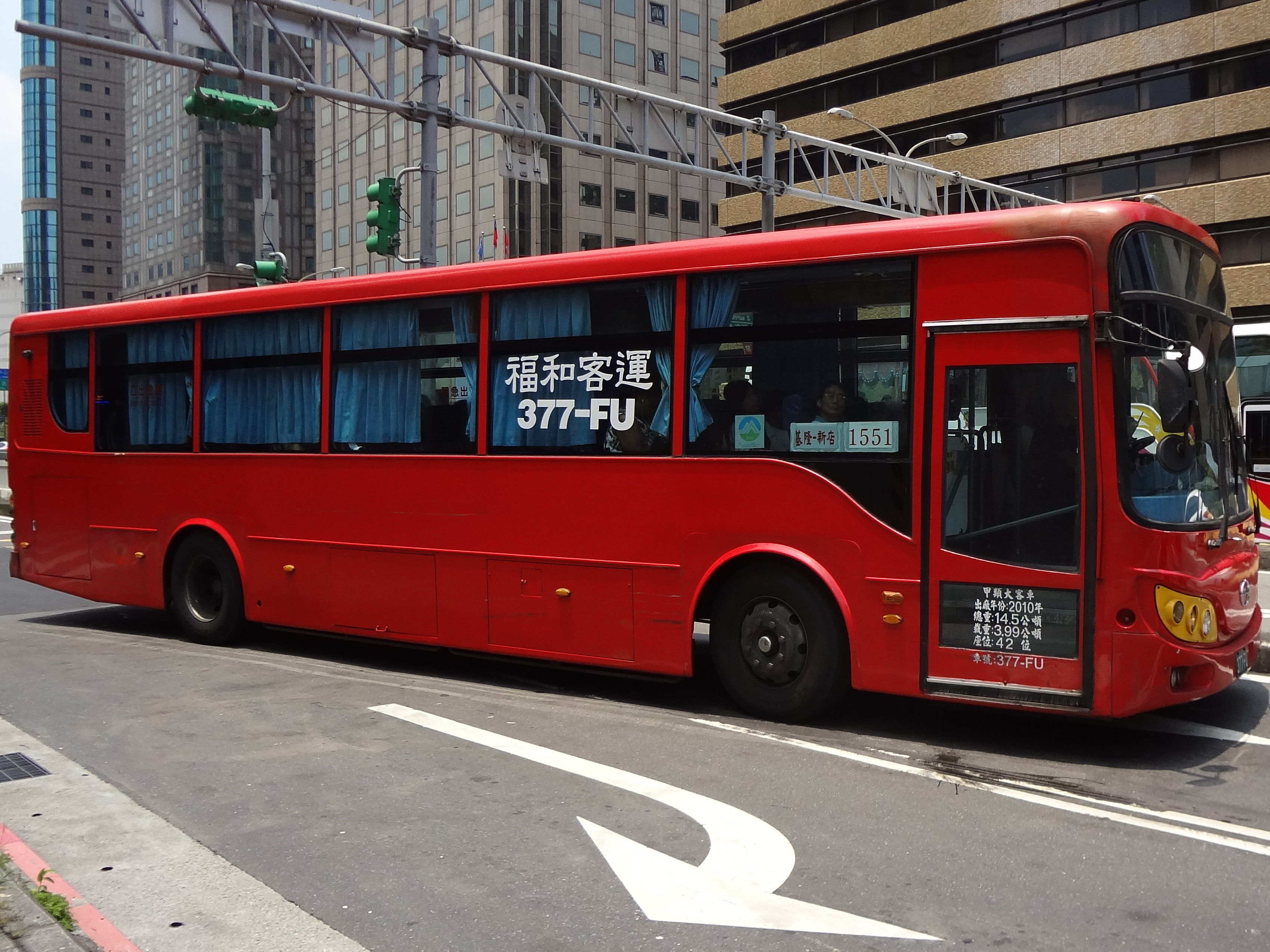 福和客運2010年日野RK8JRSA大客車377-FU。